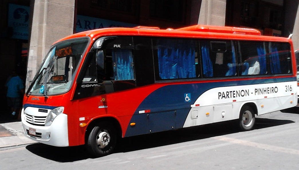 Micro-ônibus Comil Piá Mercedes-Benz do sistema de lotações de Porto Alegre.